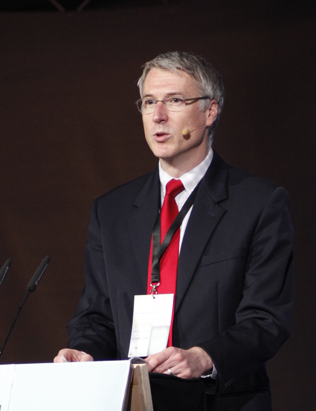 (cc) iStockphoto I re:publica 2012